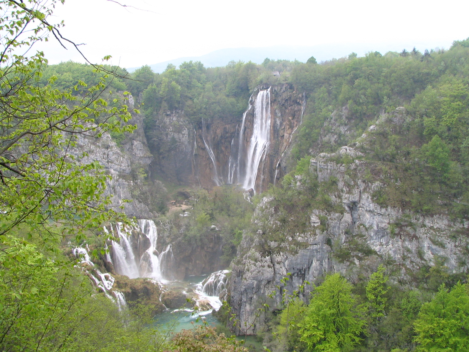 Plitvicka Jezera (Croatia)